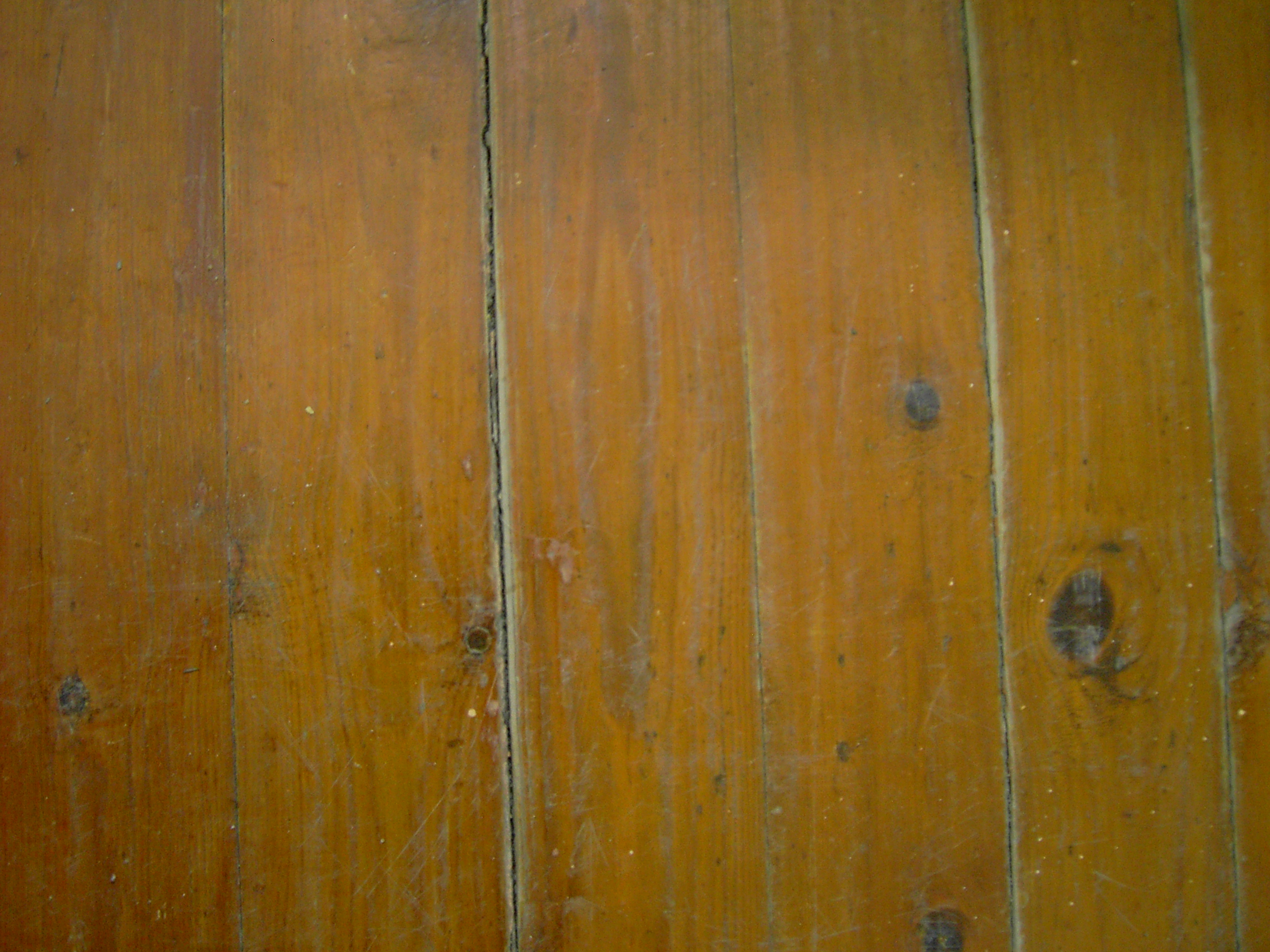 photo personnelle